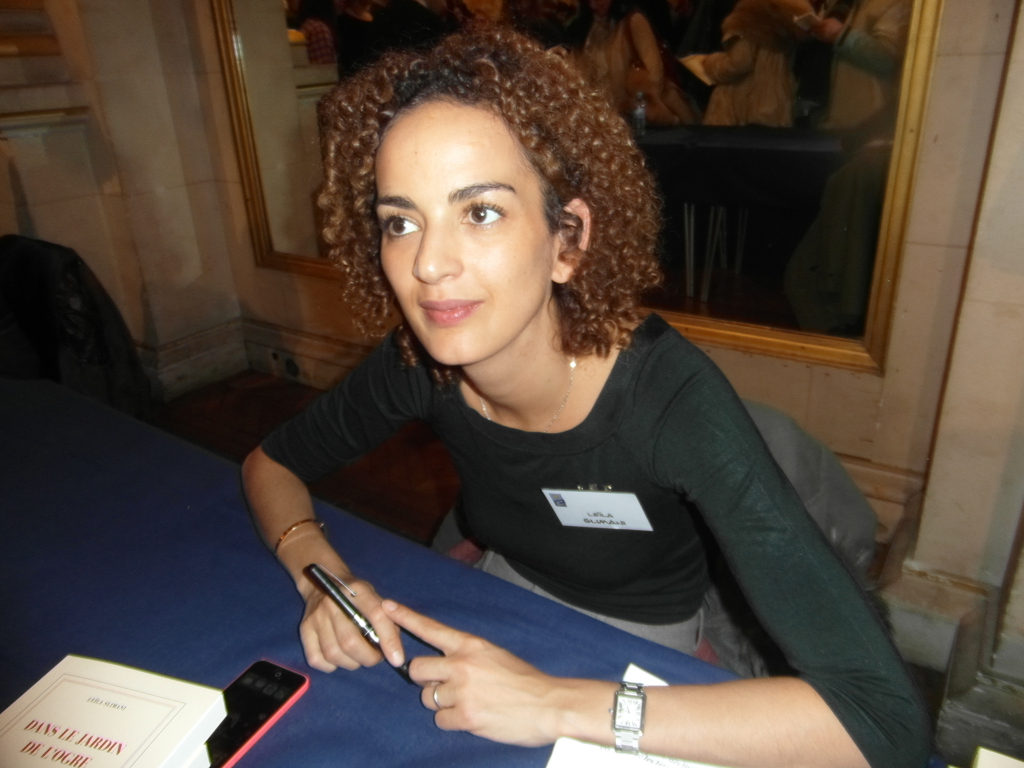 Maghreb des Livres, 7 et 8 février 2015